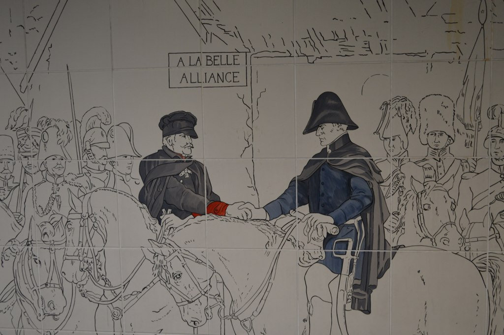 Wellington and Blucher